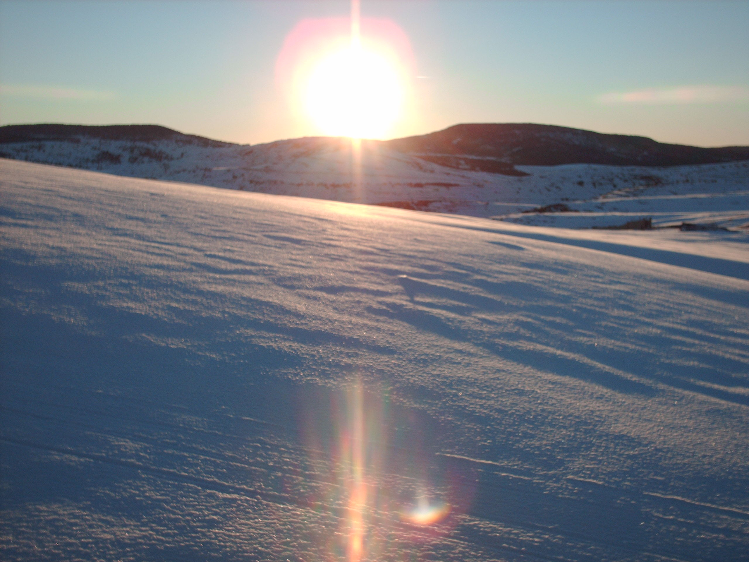 Atardecer en invierno en los alrededores de Valdelinares